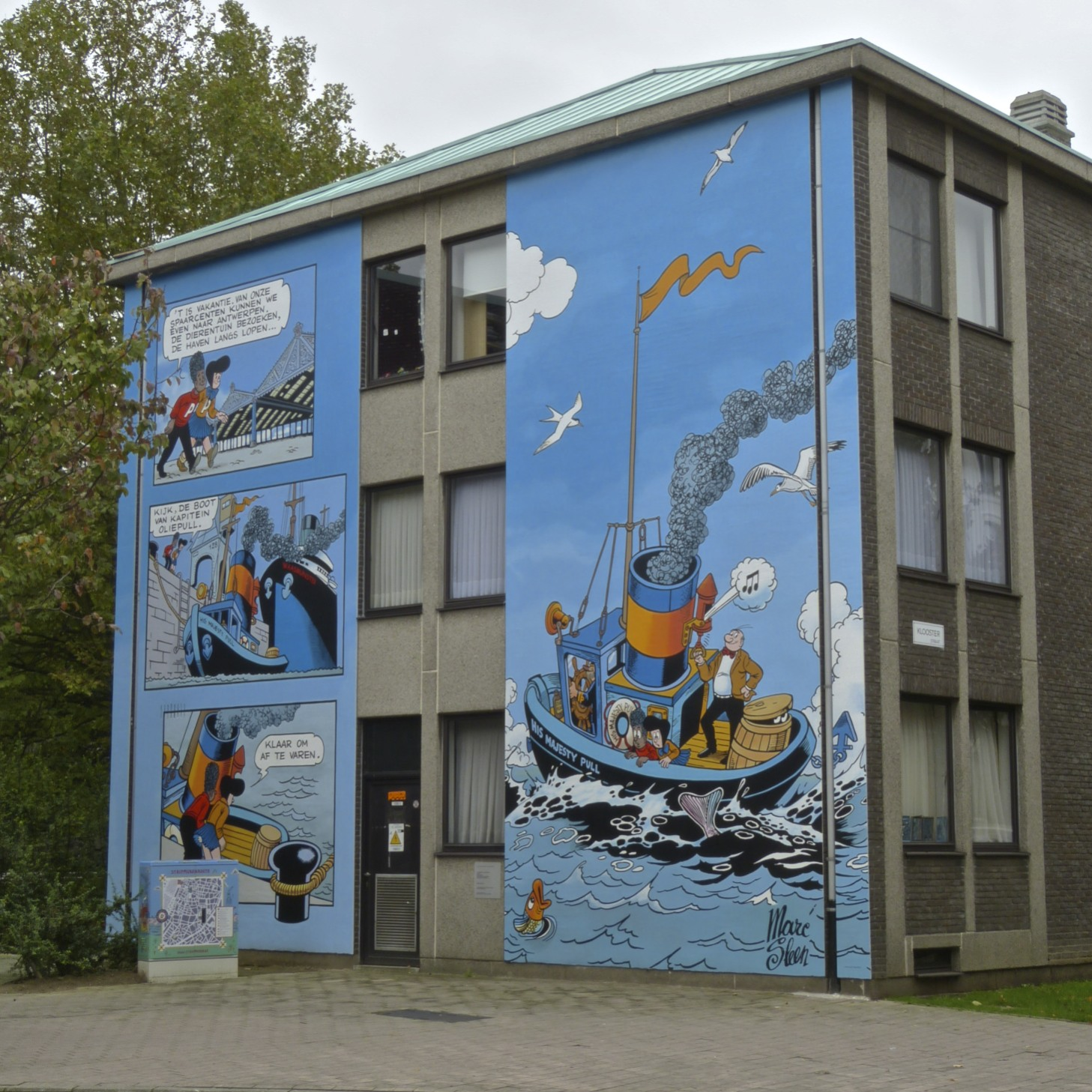 Stripmuur Nero te Antwerpen